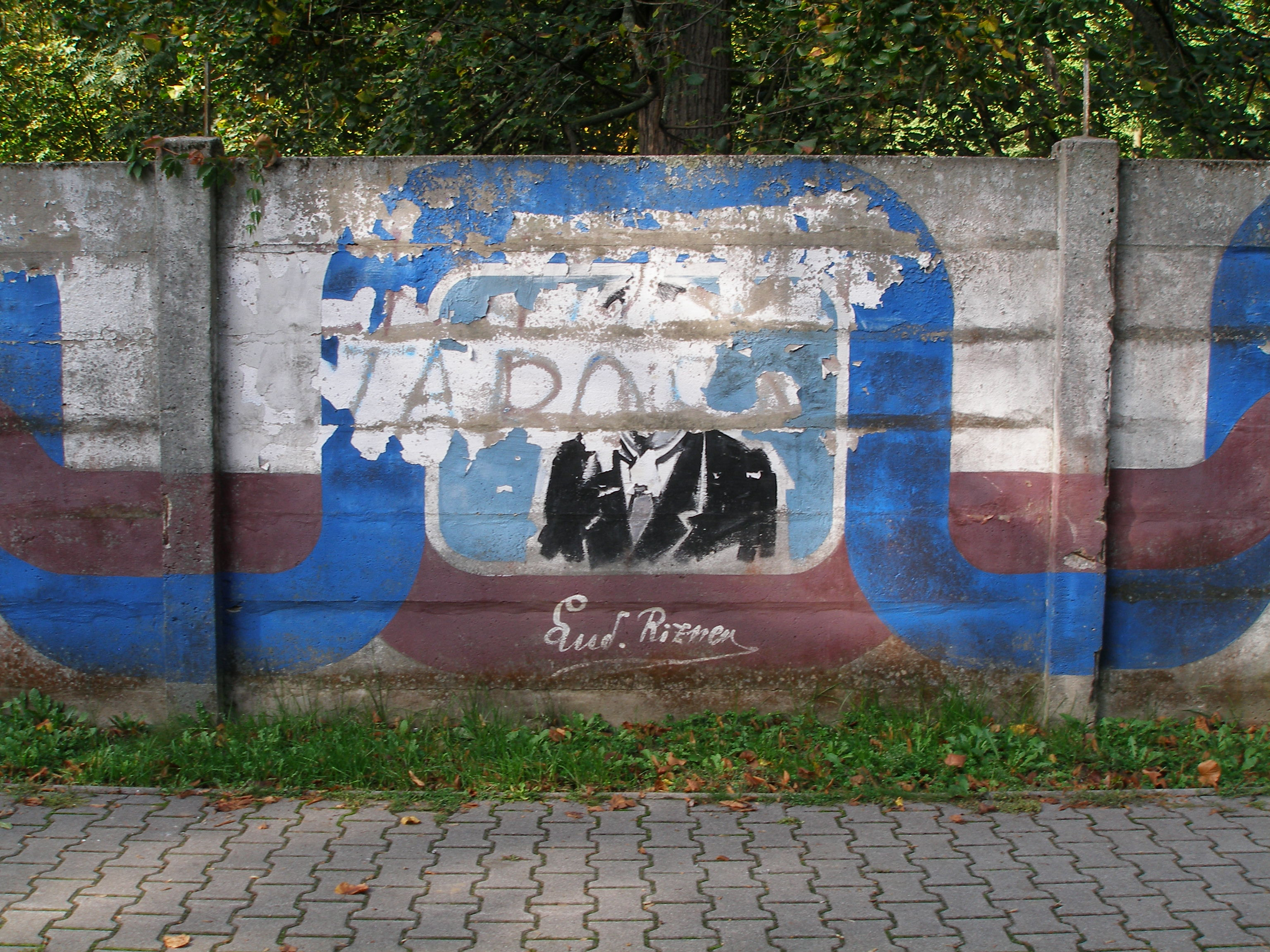 Detail obrazu Ľudovíta Vladimíra Riznera na plotě s kresbami velkých Slováků v Zeminskom Podhradie.